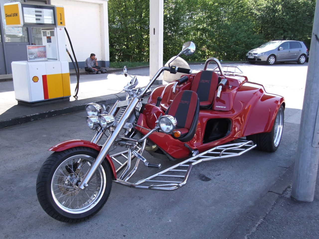 Quelle: selbst fotografiert, 04/2007 Fotograf: Späth Chr. andere Bilder: Image:Rewaco RF1-GT 2.jpg Image:Rewaco RF1-GT 3.jpg